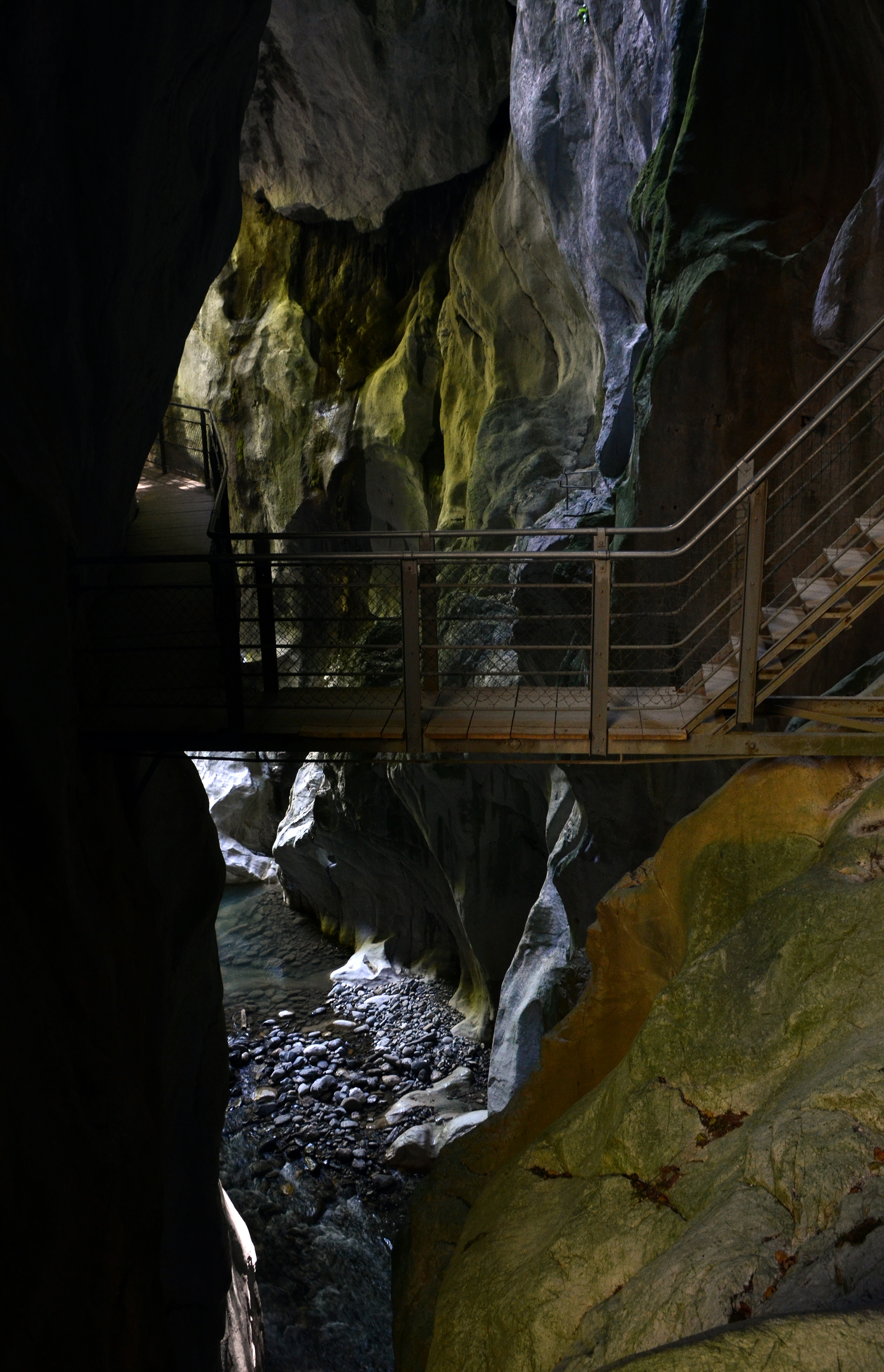 Les gorges du Pont du Diable : vue des aménagements.